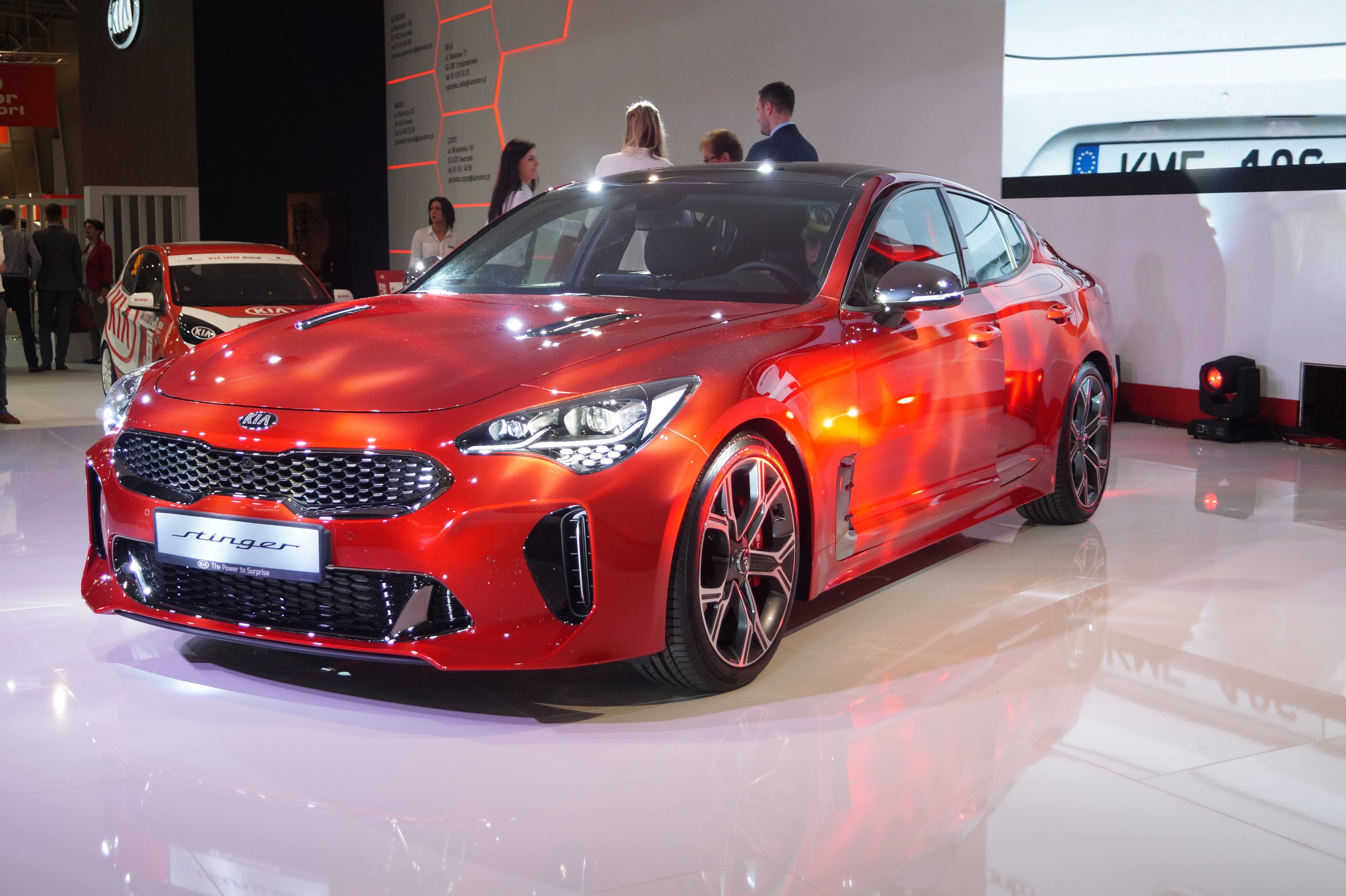 Lewy przód Kii Stinger na Motor Show Poznań 2017.